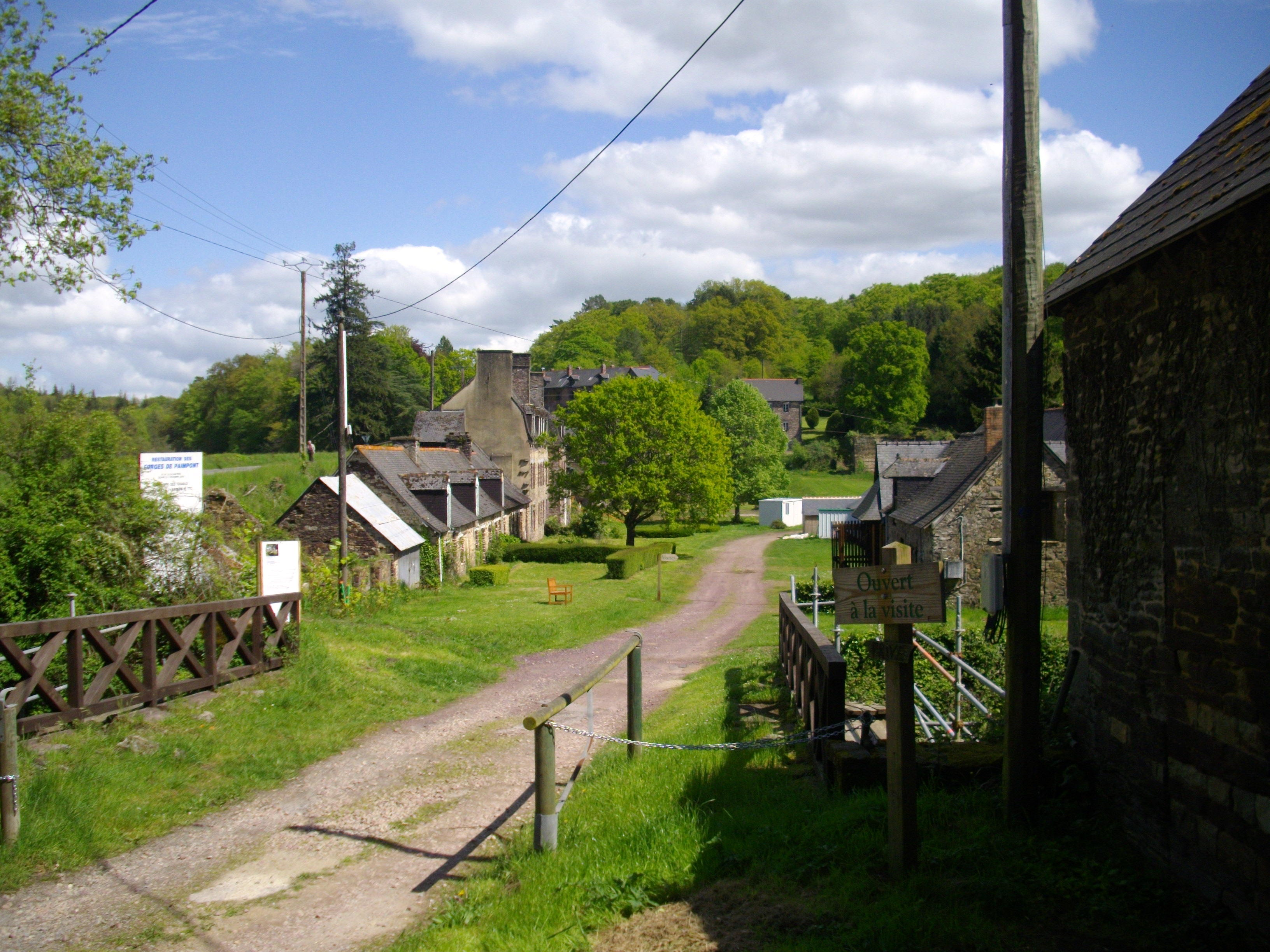 L'entrée des anciennes Forges de Paimpont